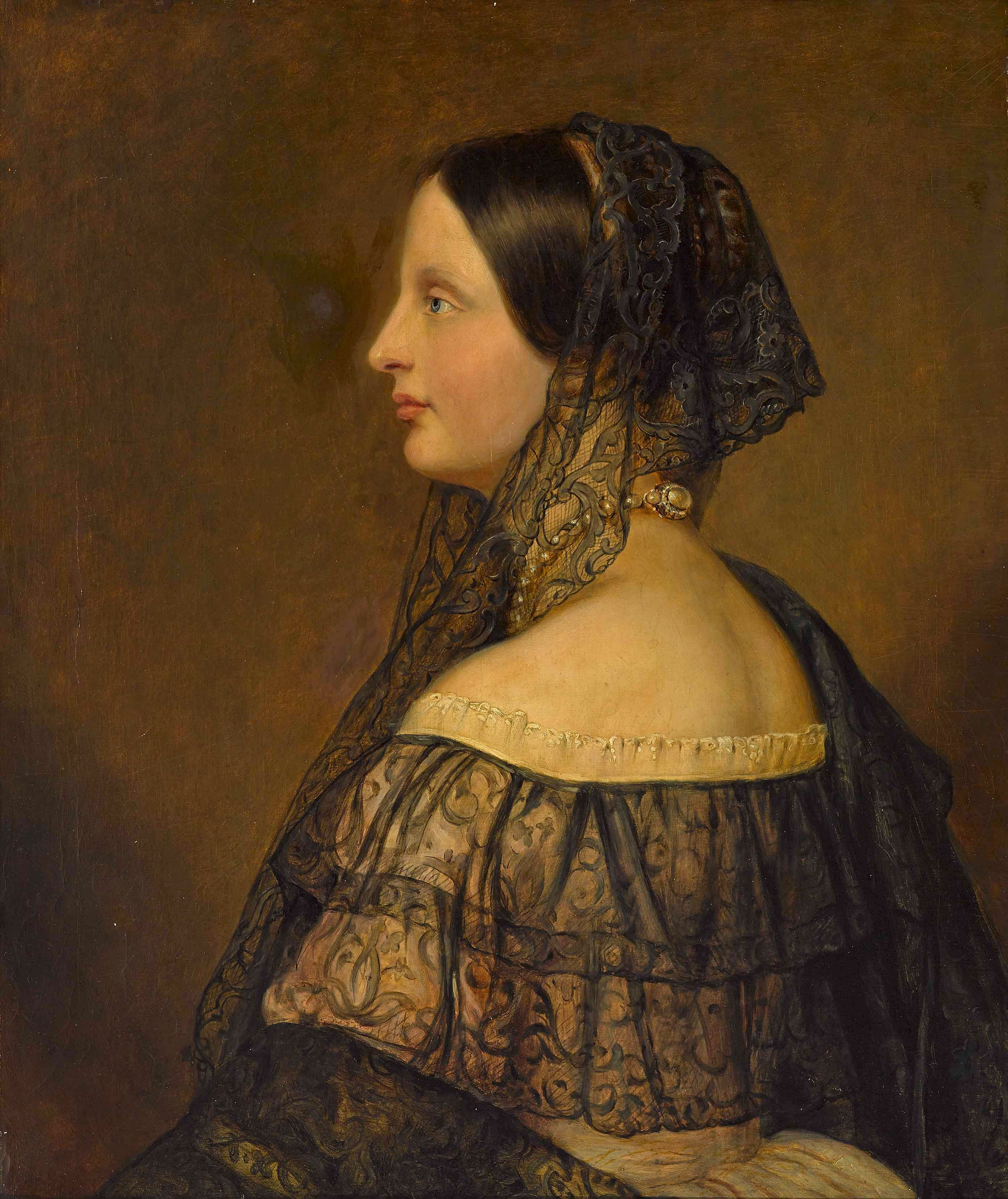 Prinzessin Auguste Ferdinande von Bayern, Erzherzogin von Österreich-Toskana (1825 - 1864)